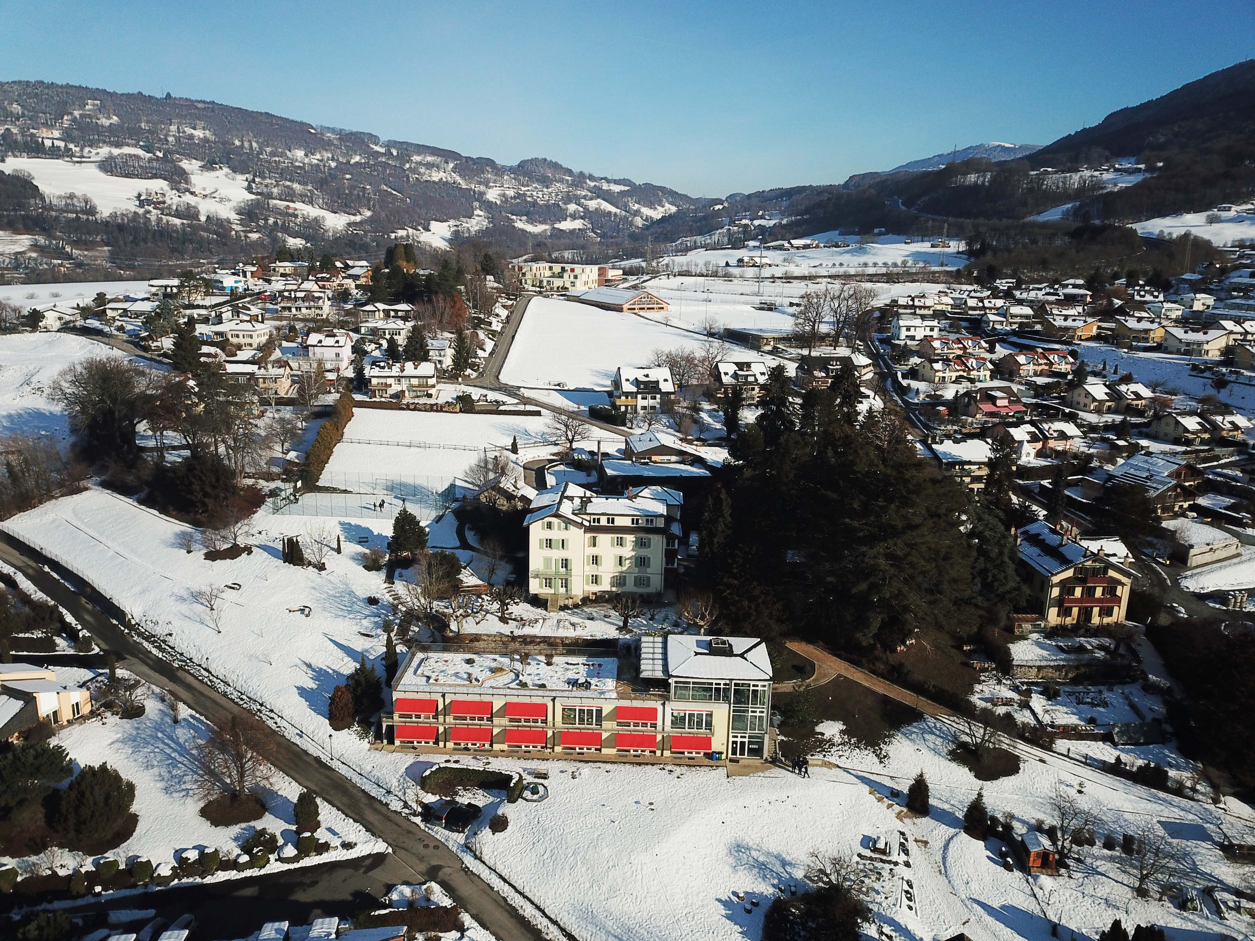 Bâtiments de l'école secondaire